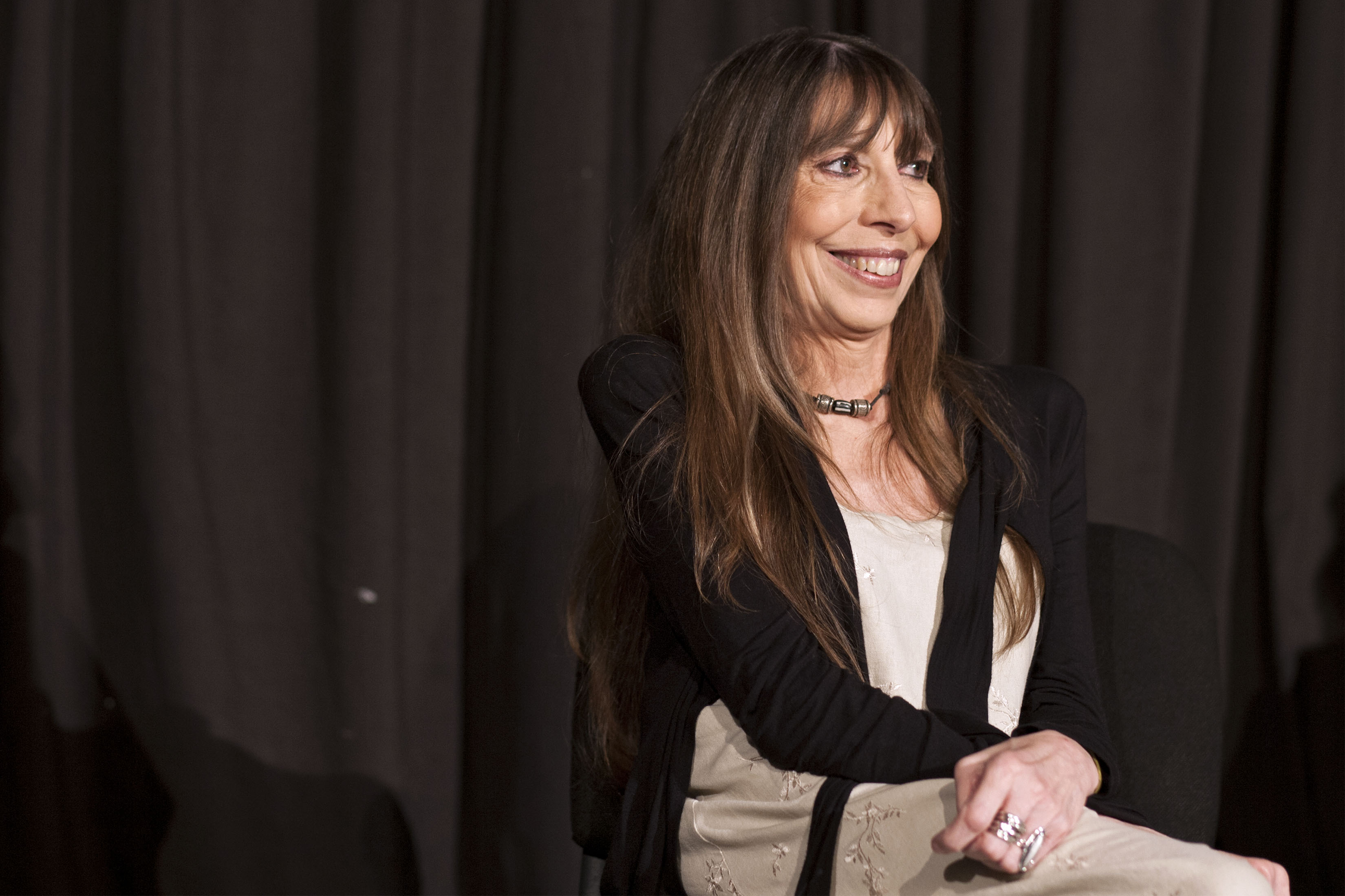 Martes, 11 de Agosto del 2015. Conferencia de prensa de la cantante Betsy Pecanins acompañada de su Banda de Músicos para anunciar su espectáculo Ave Phoenix, el cual se presentará en el Teatro de la Ciudad próximamente. Foto: Antonio Nava / Secretar’a de Cultura CDMX.